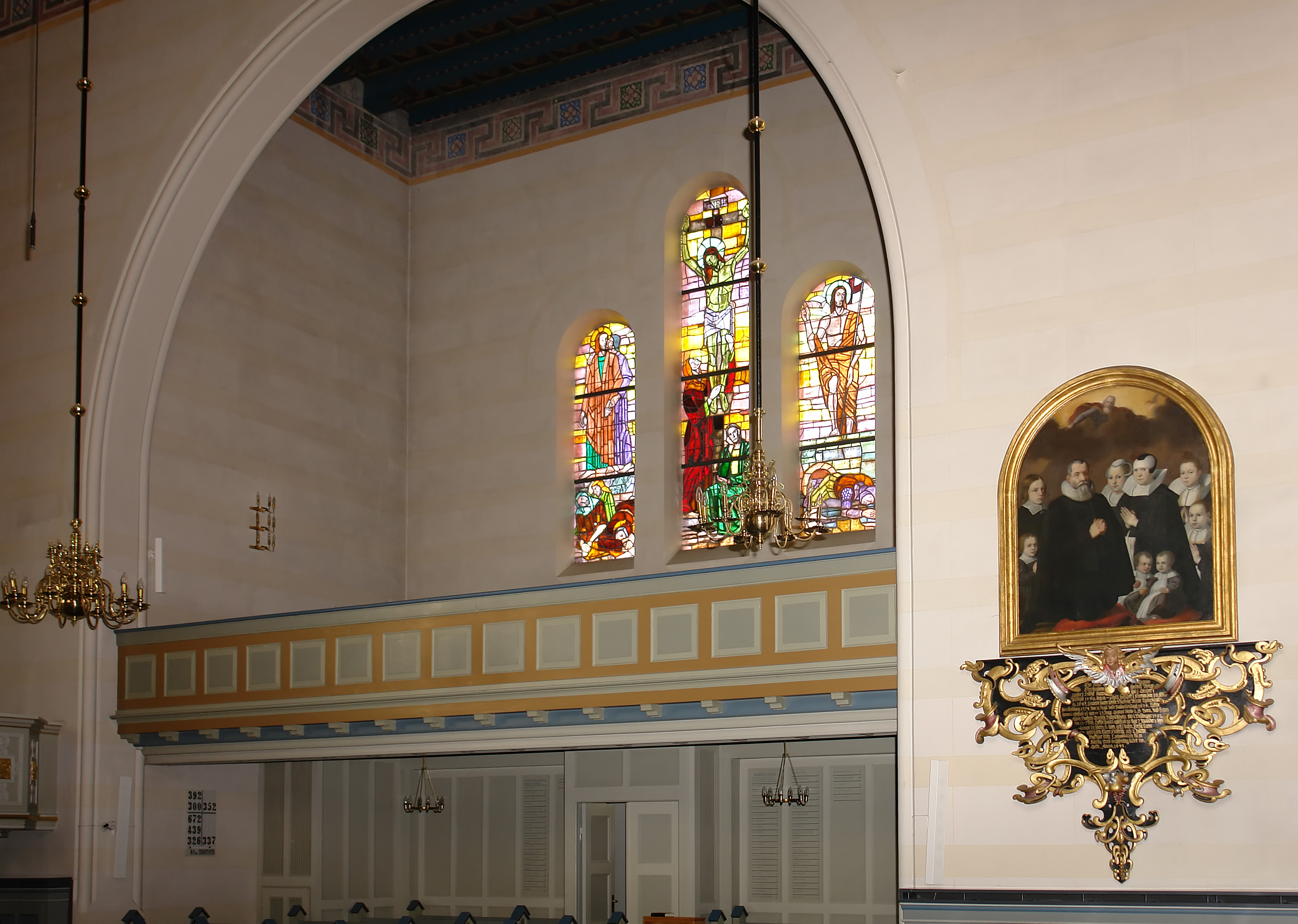 Nikolai Kirche Holbæk, DK: Seitenschiff-Ost und Epitaph von 1648: Bürgermeister Mogens Christensen (1569-1645), seine beiden Frauen (Mette Lydersdatter, †1624; Dorthe Lauridsdatter) und sechs Kinder